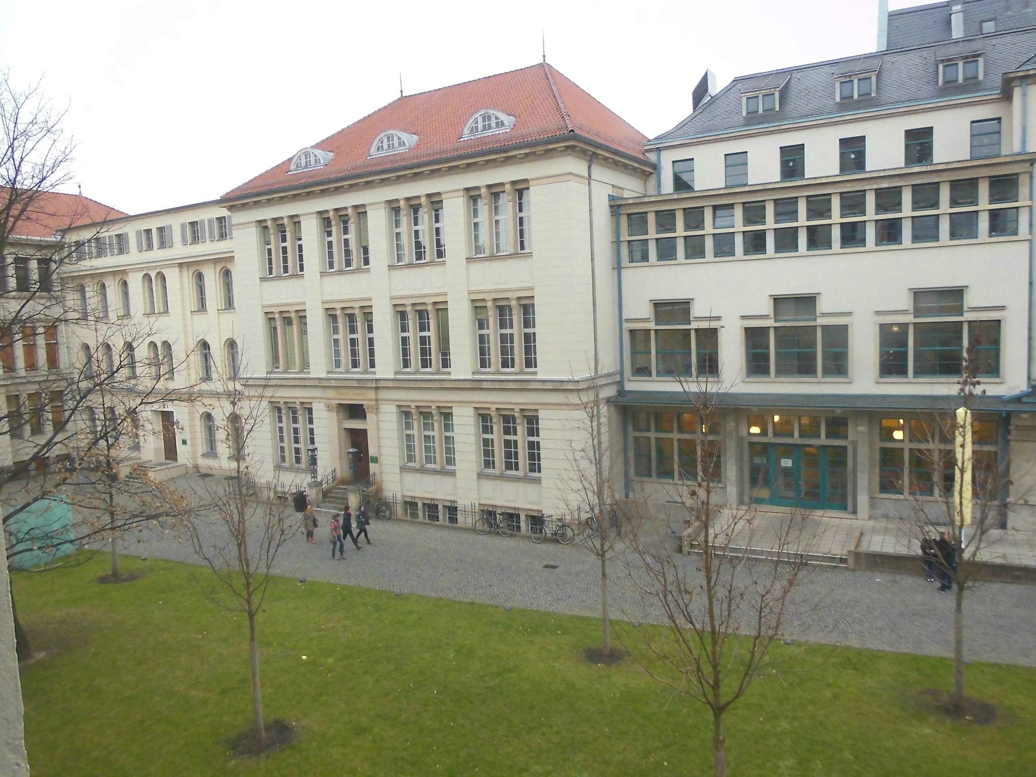 Uni Halle Thomasianum + Verwaltung